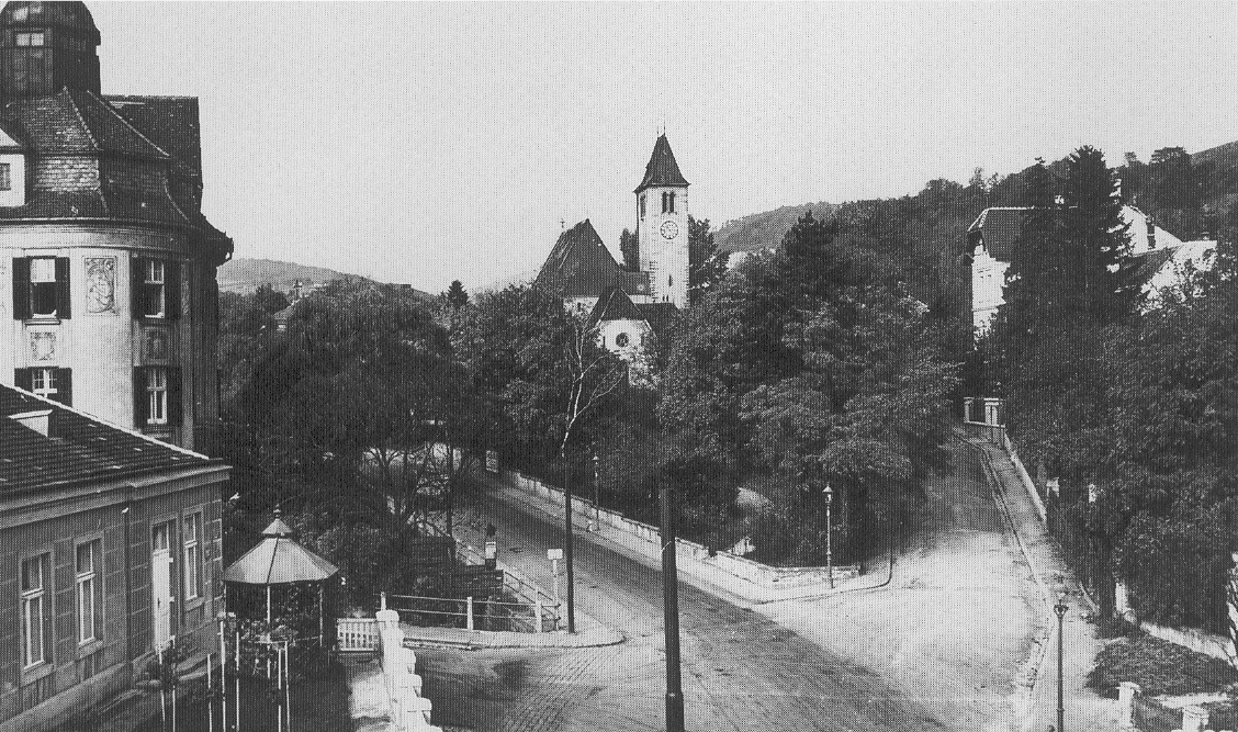 Sieveringer Pfarrkirche, Crossing Sieveringer Straße/Fröschlgasse 1915 (Döbling)